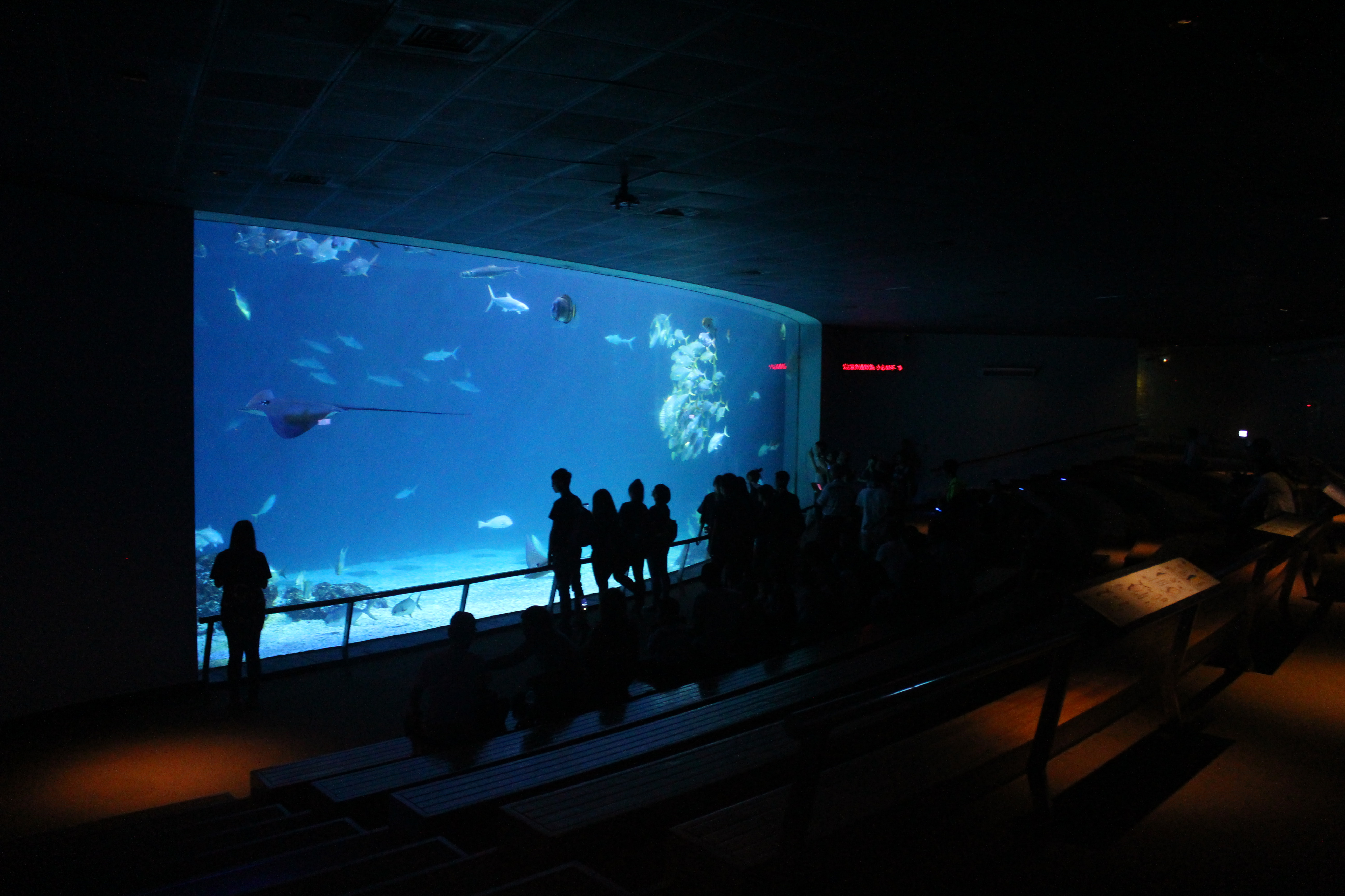 國立海洋生物博物館臺灣水域館大洋池。